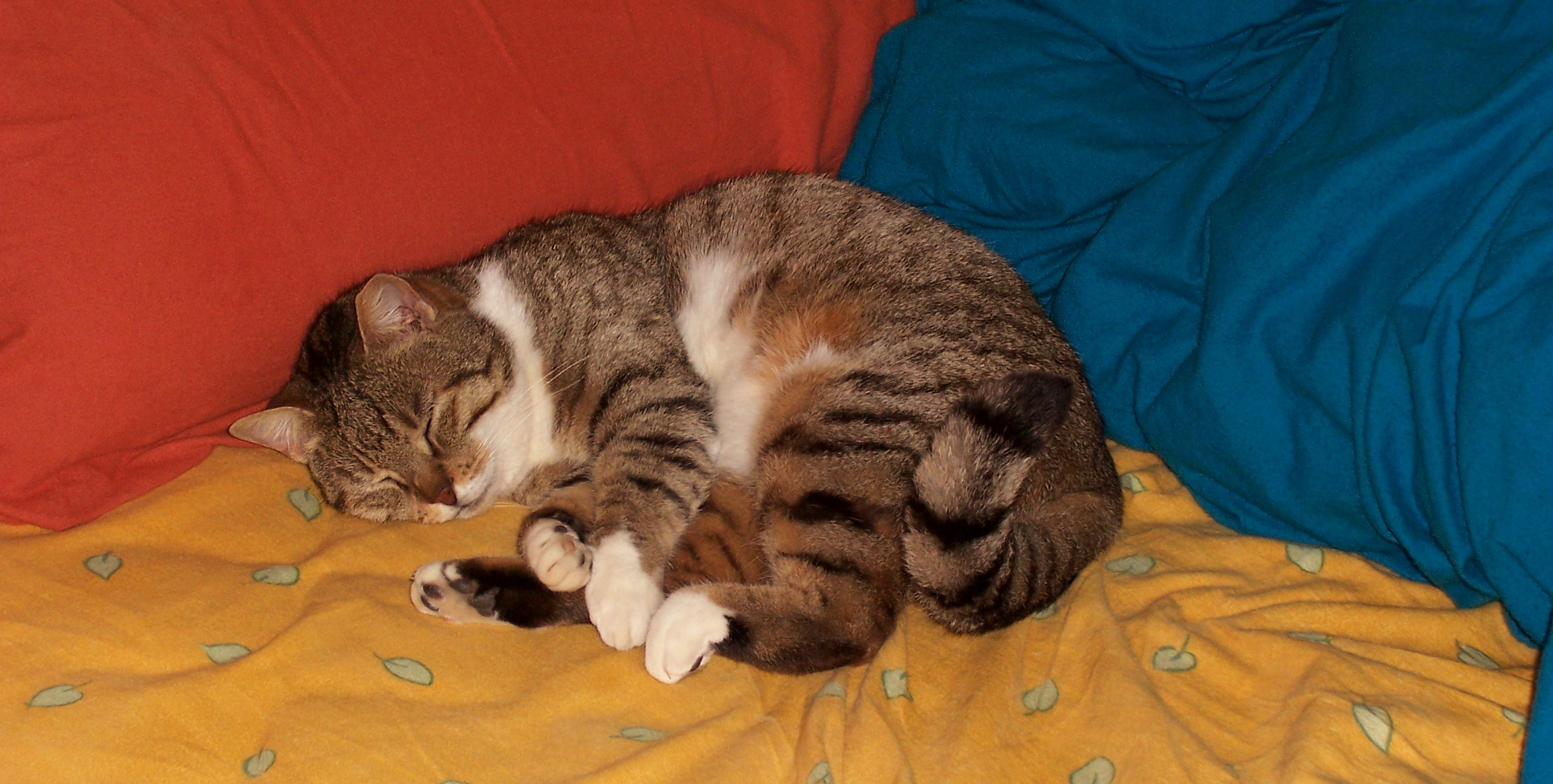 החתולה מיציבוץ מקיבוץ בית אורן